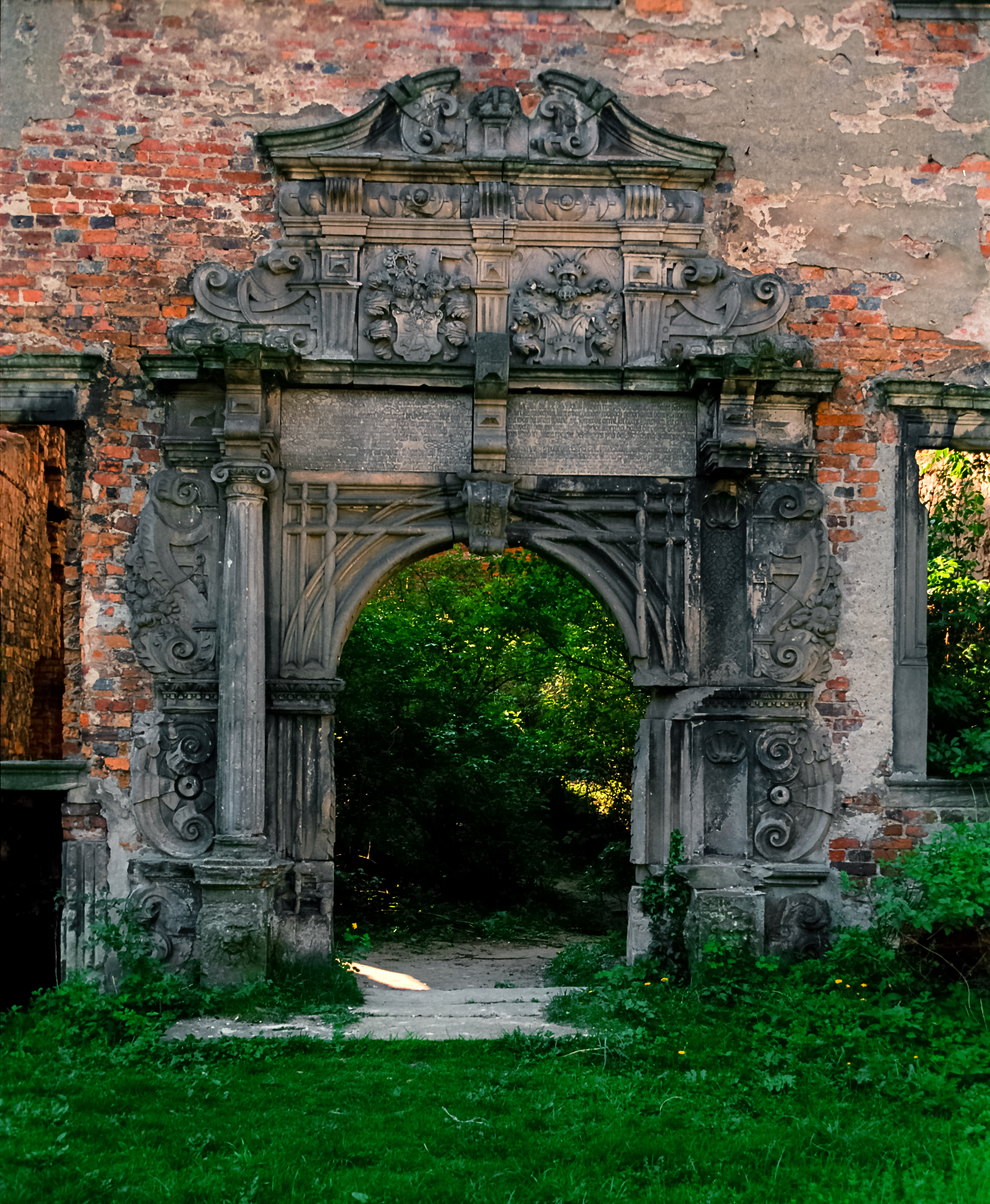 Siedlisko